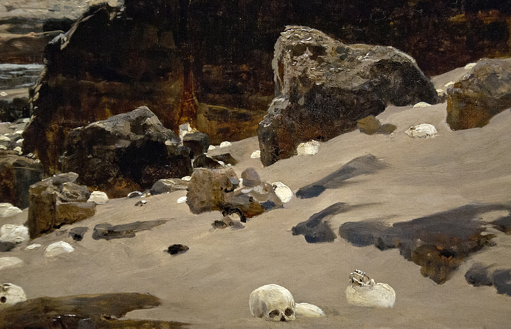 Detail des Gemäldes "Gestade der Vergessenheit"